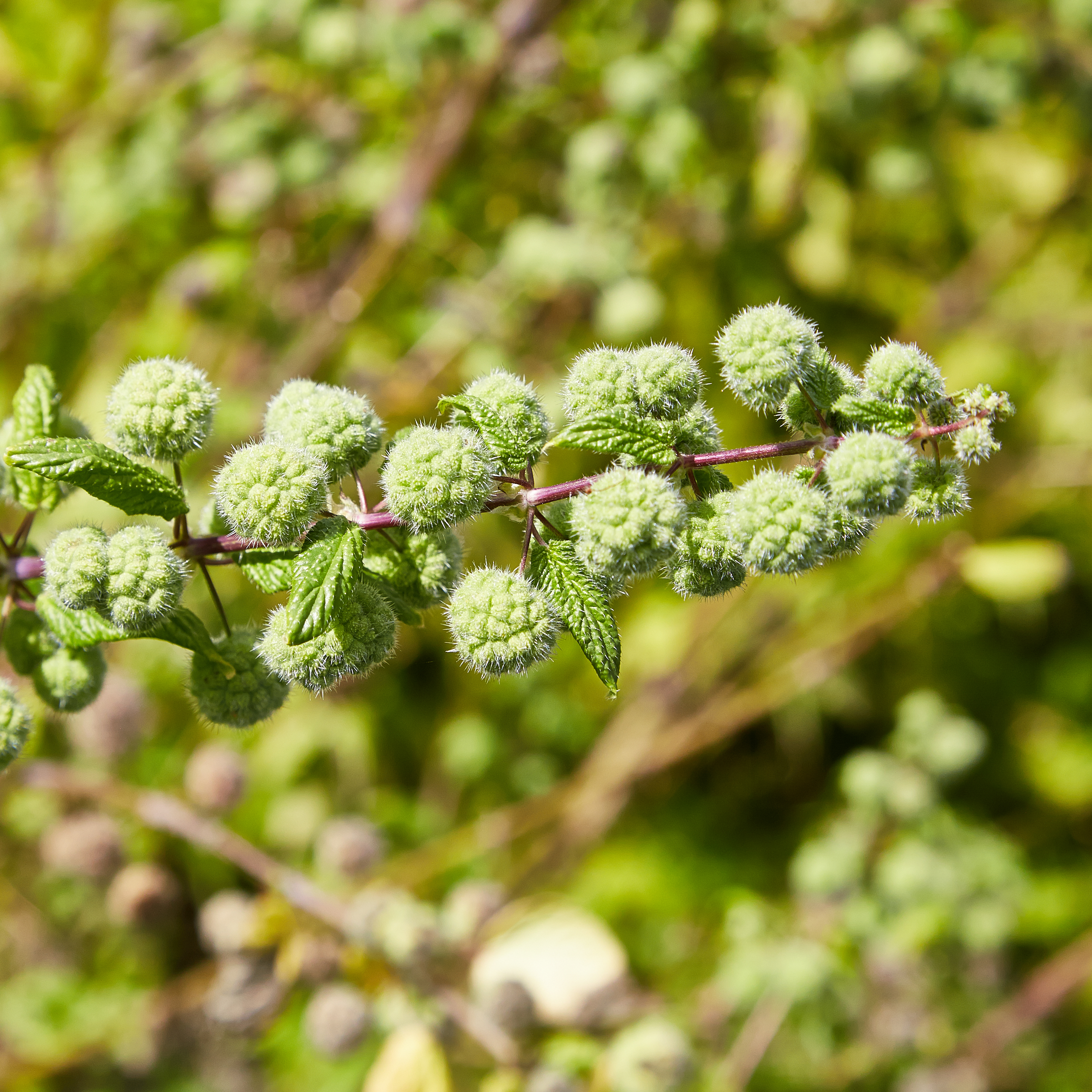 Urtica pilulifera identifierad med hjälp av befintlig skylt i Bergianska trädgården.